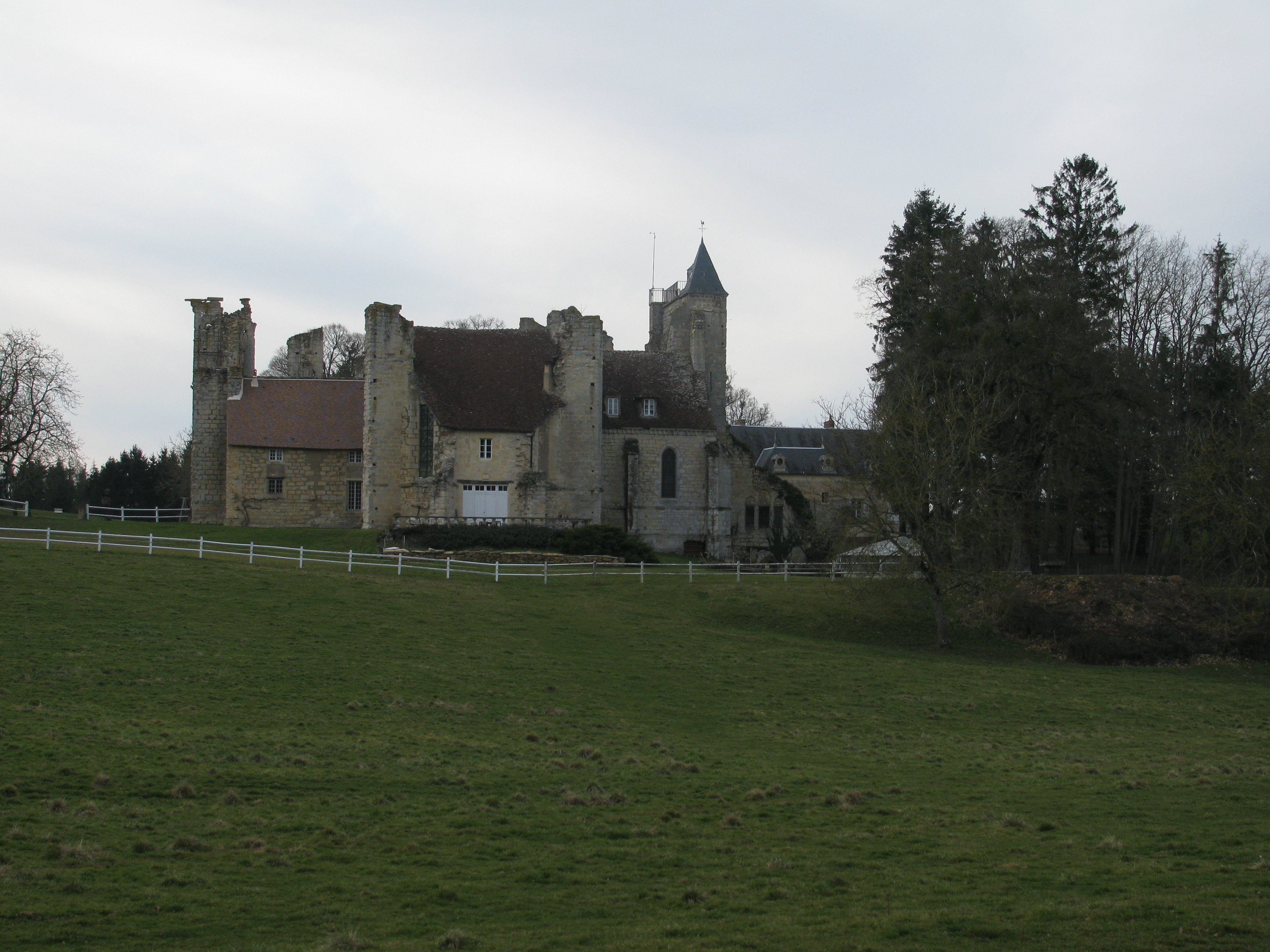 L'église ruinée du prieuré de l'épeau, Nièvre, France.